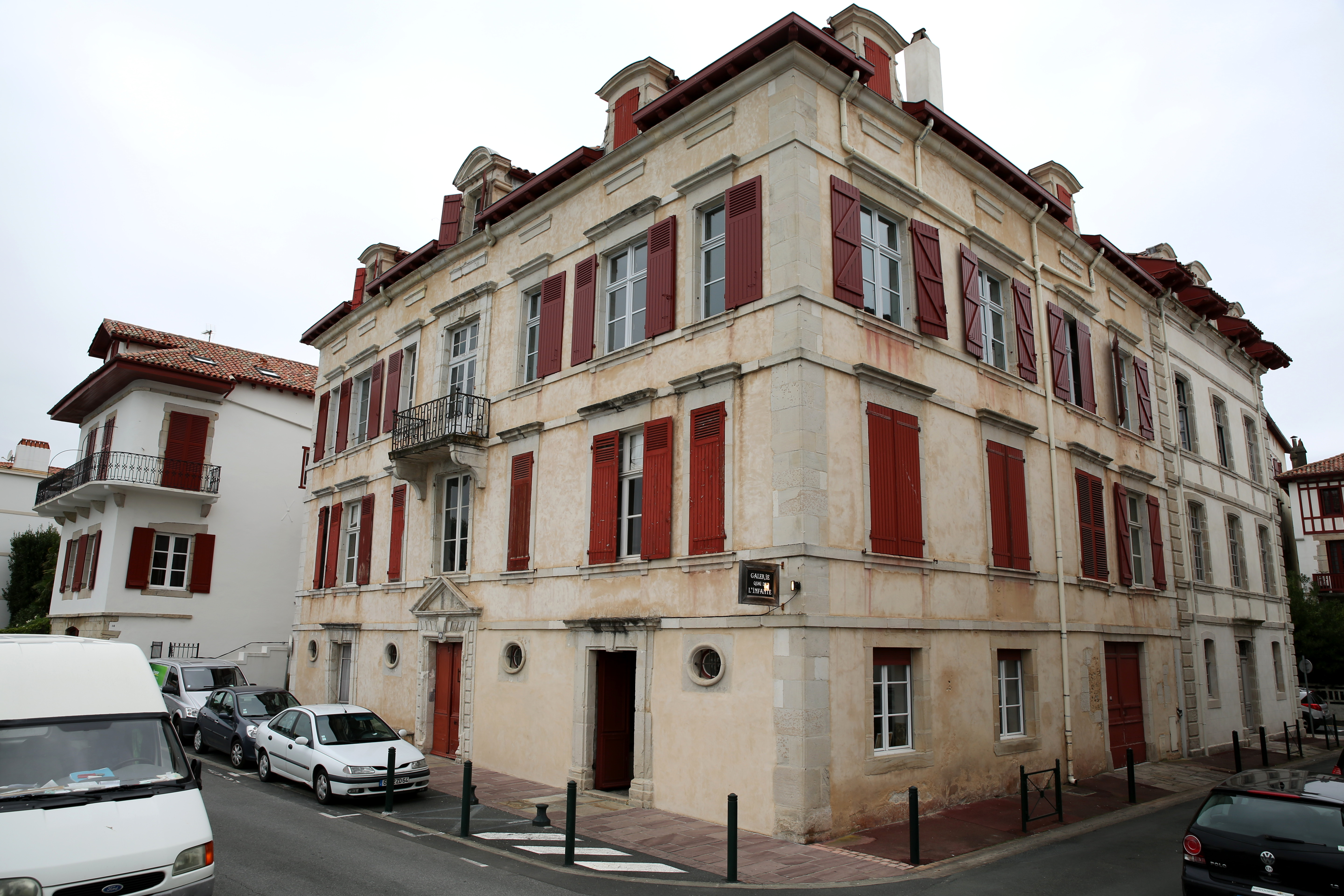 Maison Betbeder-Baïta .